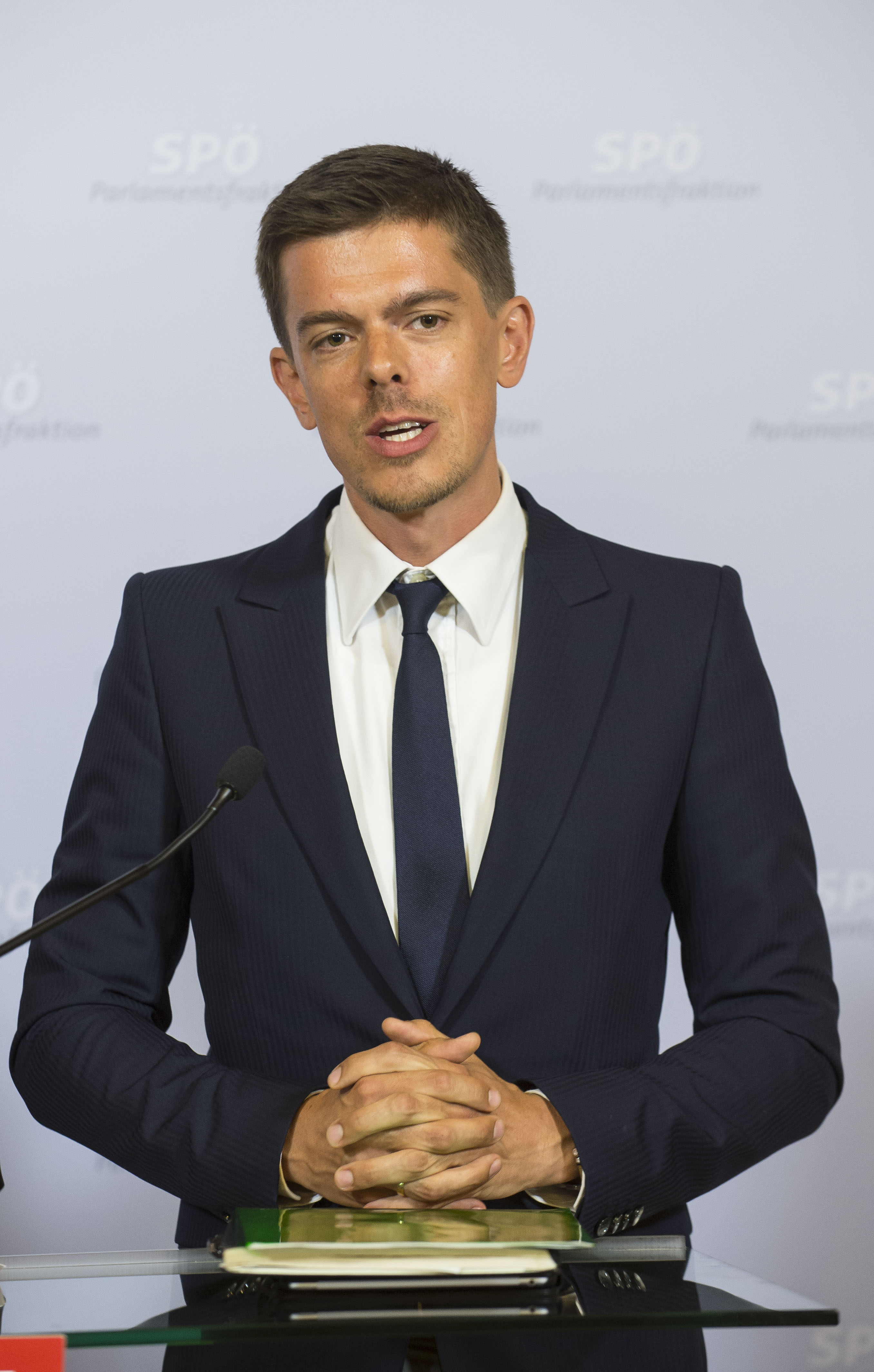 Der SPÖ-Bundesparteivorstand hat am Freitagnachmittag über personelle Änderungen sowohl in der SPÖ-Bundesgeschäftsstelle als auch in der SPÖ-EU-Delegation abgestimmt. In einer anschließenden Pressekonferenz präsentierte SPÖ-Vorsitzender, Bundeskanzler Werner Faymann die Weichenstellungen. Im Bild: SPÖ-Kommunikationschef Matthias Euler-Rolle. Wien, 03.07.2015, © Thomas Jantzen / SPÖ